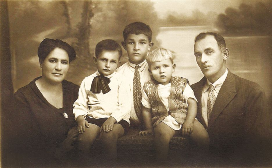 פרנץ ואן דר הורן עם אשתו צילה והילדים ניצה צבי ויונתן (יפדה עוד לא נולד)